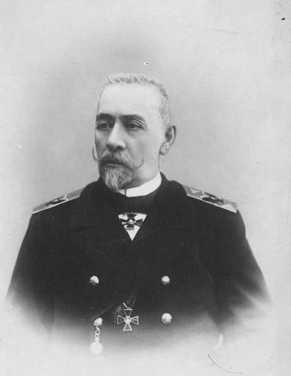 Морской министр, вице - адмирал А. А. Бирилев (портрет). Данное изображение было использовано в статье «Бирилев, Алексей Алексеевич» опубликованной в четвёртом томе «Военной энциклопедии», который был издан книгоиздательским товариществом Ивана Дмитриевича Сытина в 1911 году в столице Российской империи городе Санкт-Петербурге.